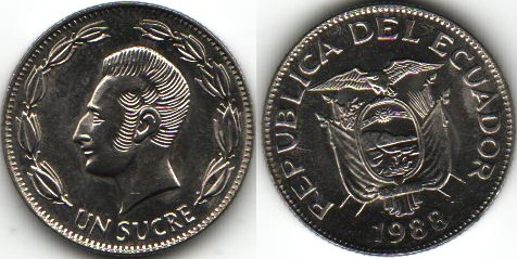 Ecuadorian 1 Sucres Coin